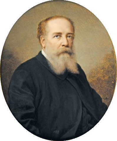 Autoportrait